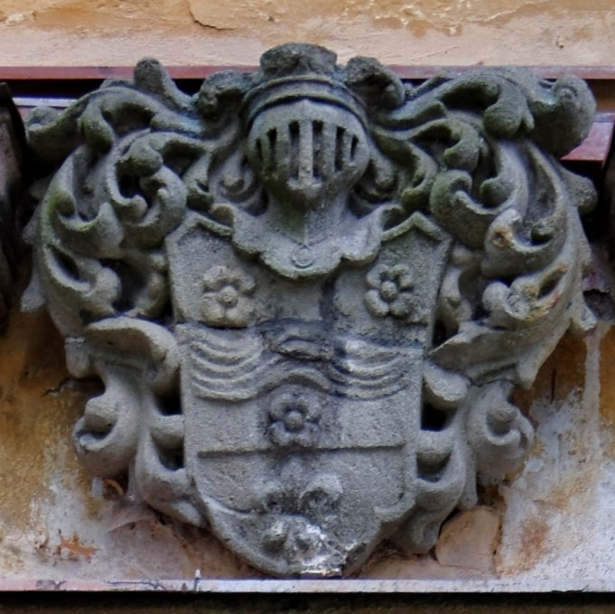 Wappen Putz von Breitenbach St. Laurentius Luka